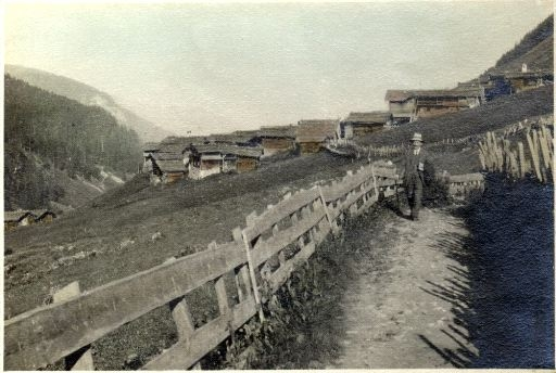 Strassberg im Fondei (politisch Arosa, ehem. Langwies), alte Ansichtskarte